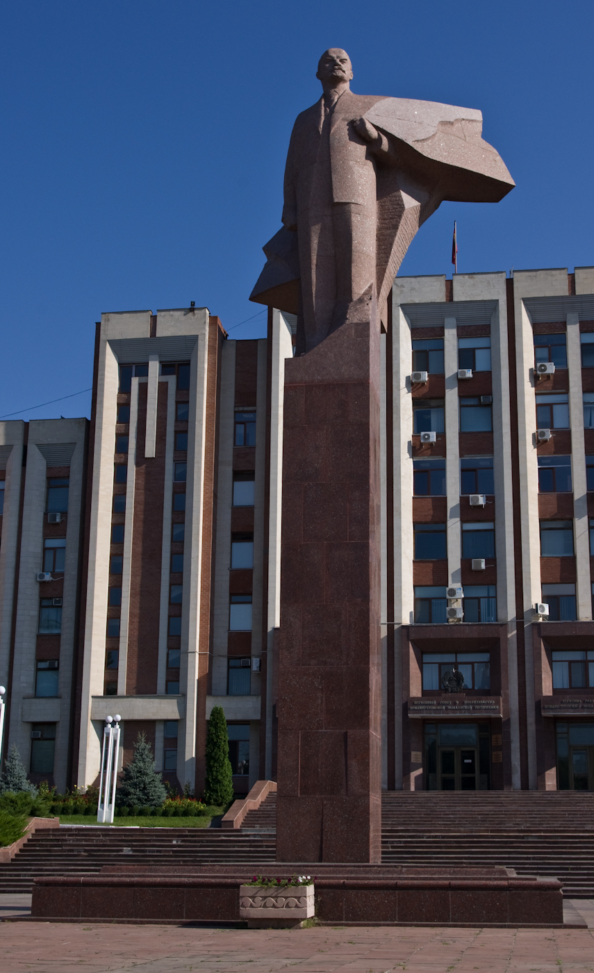 Памятник Ленину в Тирасполе перед зданием Верховного Совета и правительства ПМР